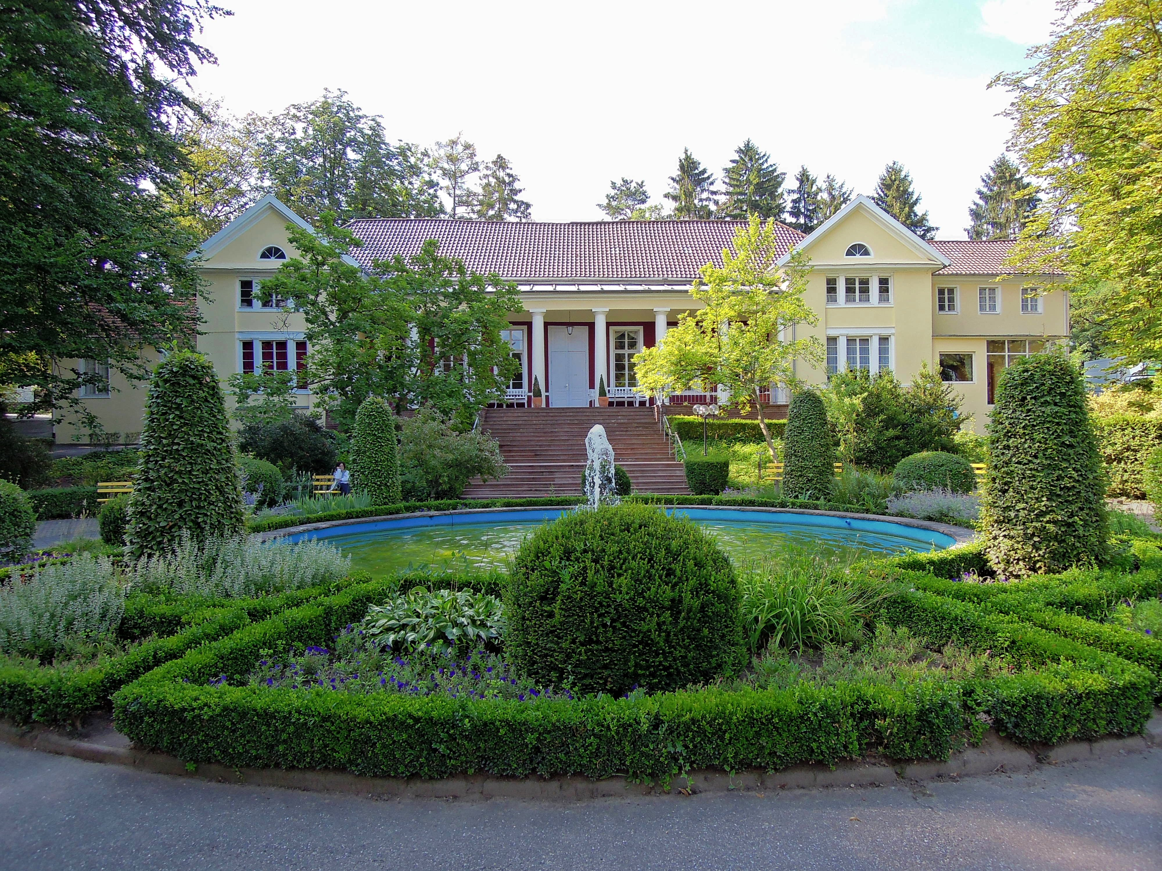 Stadtpark